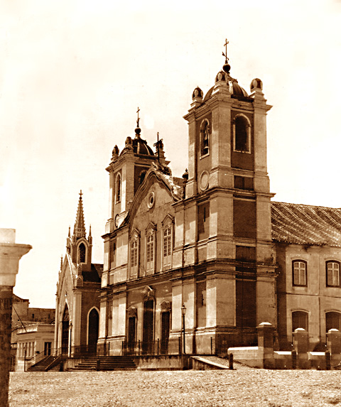 Antiga Matriz e Capela do Divino Espírito Santo